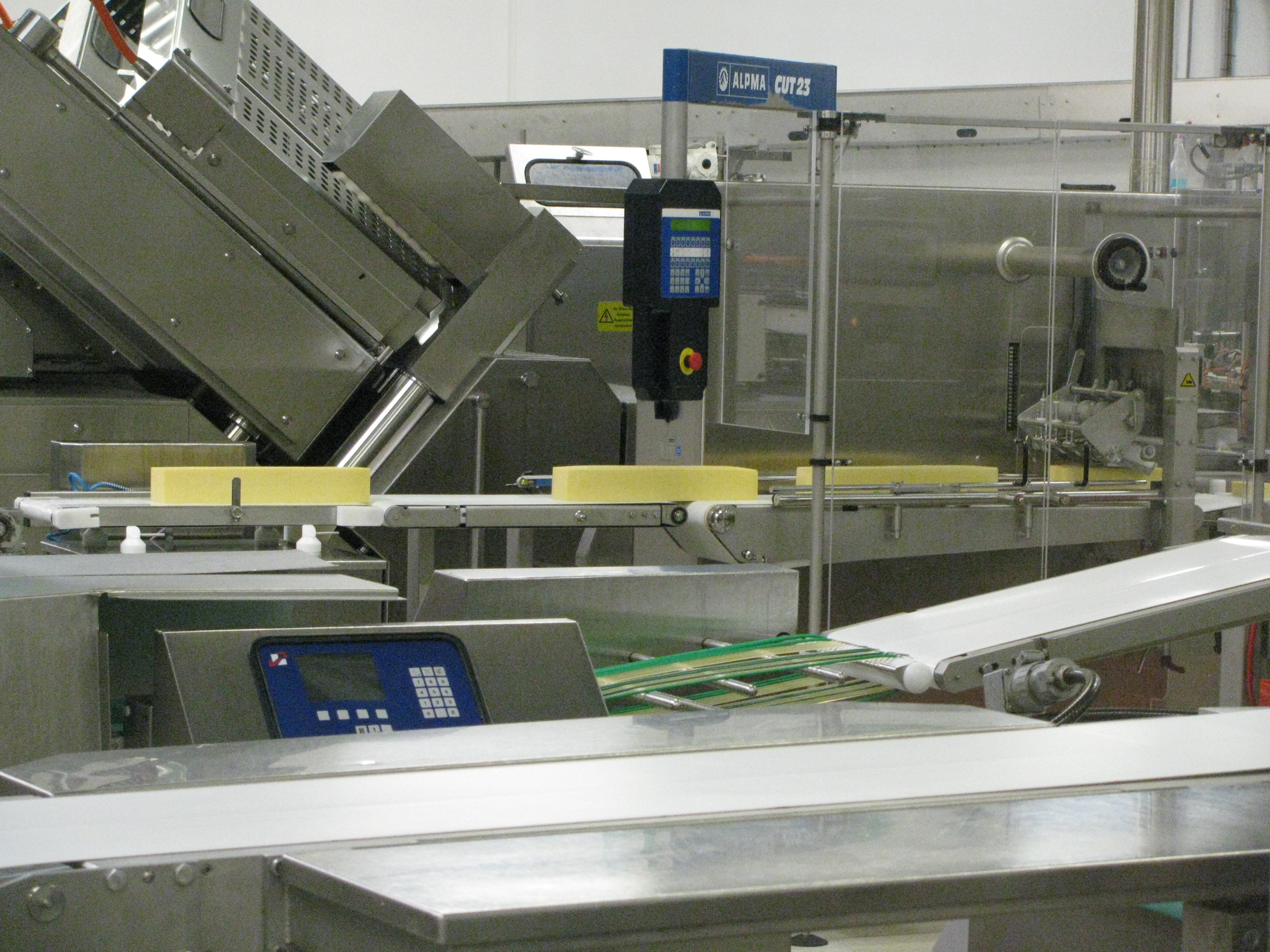 Käseblöcke in der Produktionsanlage der Heinrichsthaler Milchwerke, Radeberg